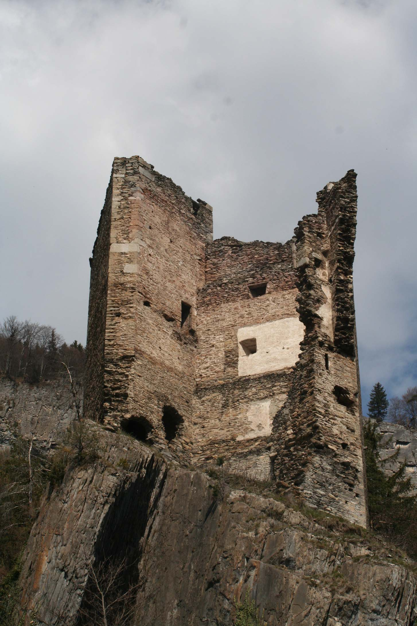 Ruine Haldenstein